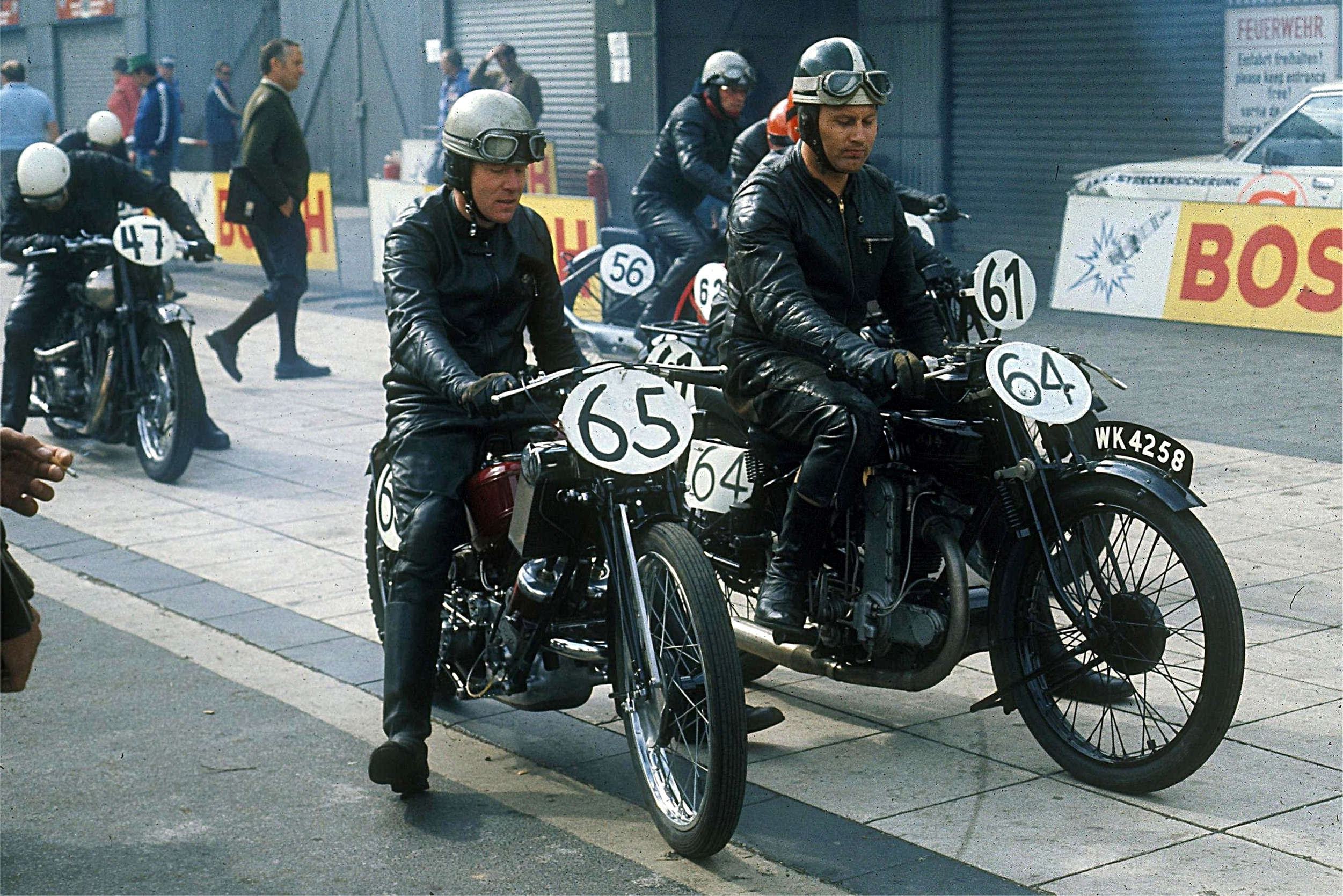 Bildbeschreibung: Vor dem Start zum Oldtimer-Grand-Prix 1975 auf dem Nürburgring Fotograf: Lothar Spurzem Datum: 16.08.1975 Die Startnummern 65 (Scott-TT-Replica) und 64 sind im Programmheft nicht aufgeführt; deshalb keine weiteren Angaben über Maschinen und Fahrer.